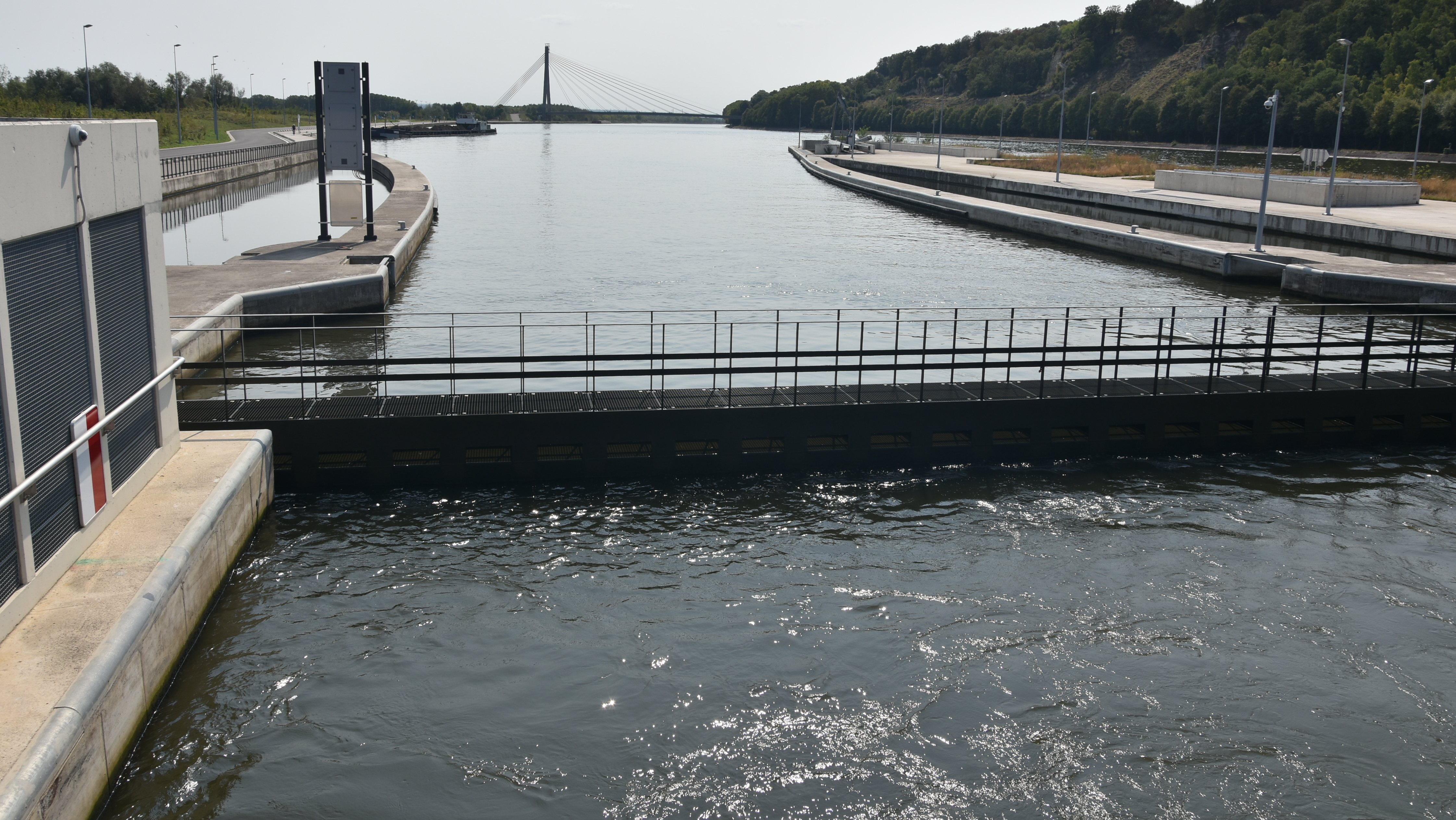 Sluis Klein-Ternaaien 28-08-2018 This photo of immovable heritage has been taken in the Walloon Region